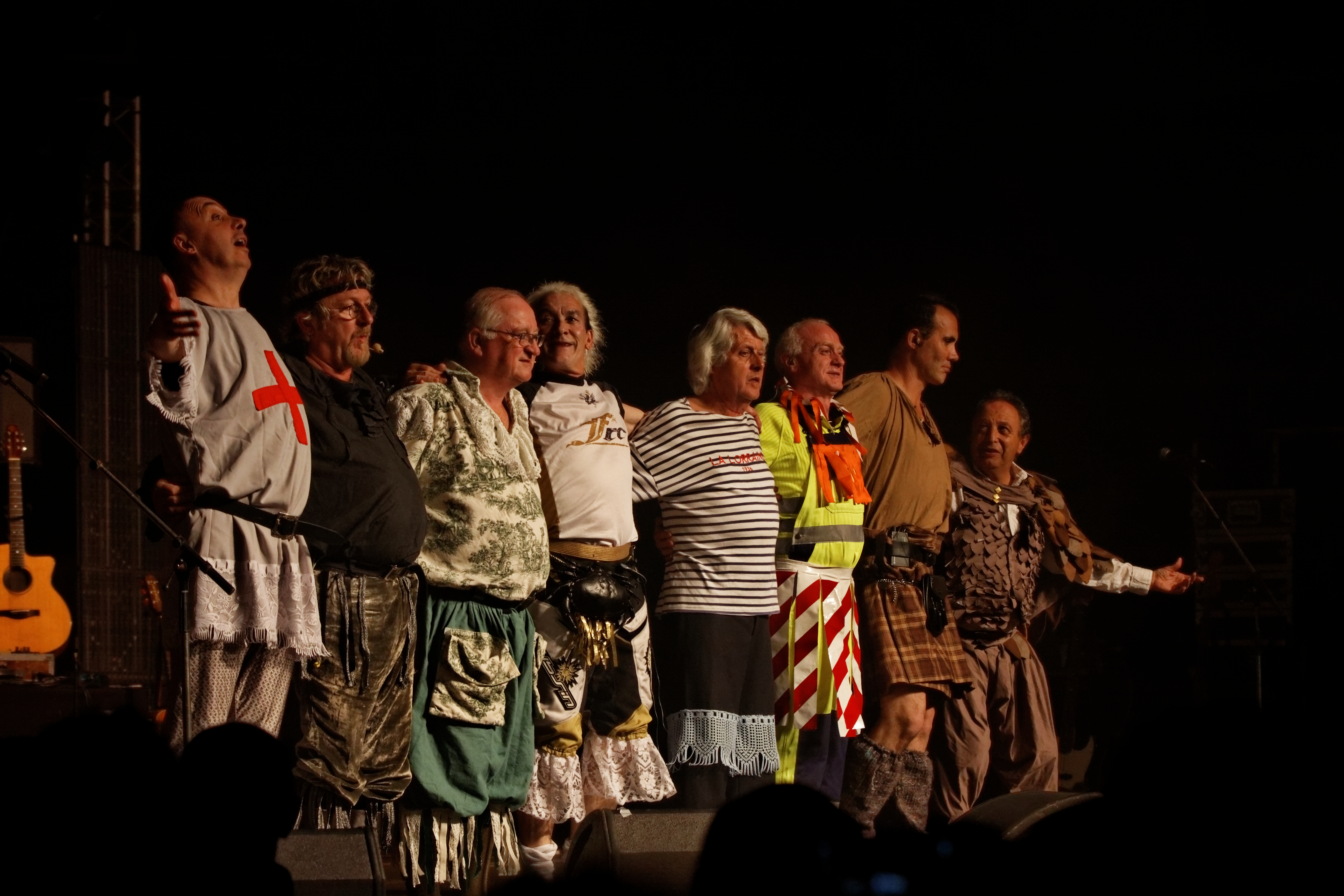 Tri Yann en concert à l'espace Gradlon lors du festival de Cornouaille 2012.